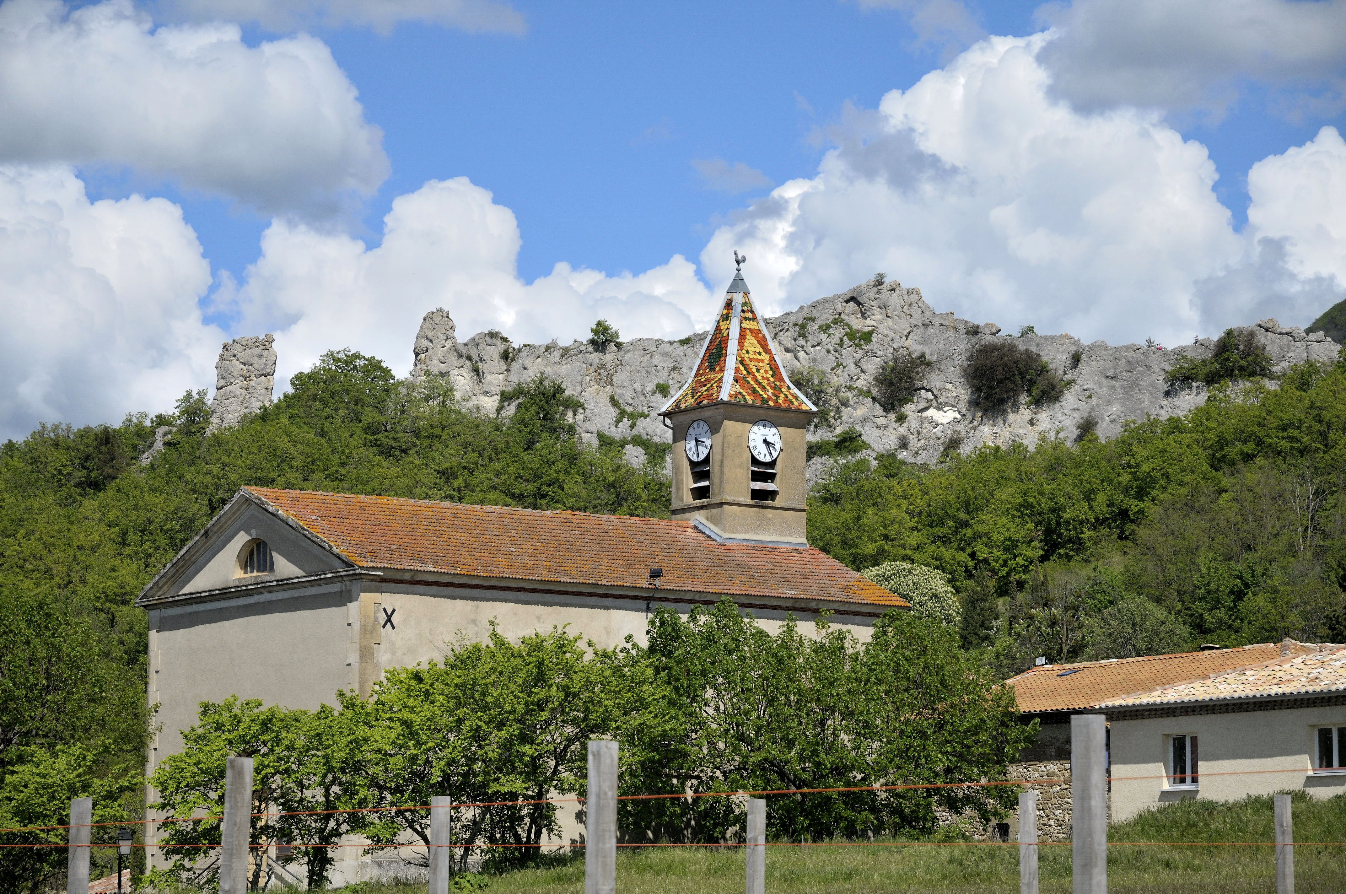 temple et en arrière plan, portion de la pangée